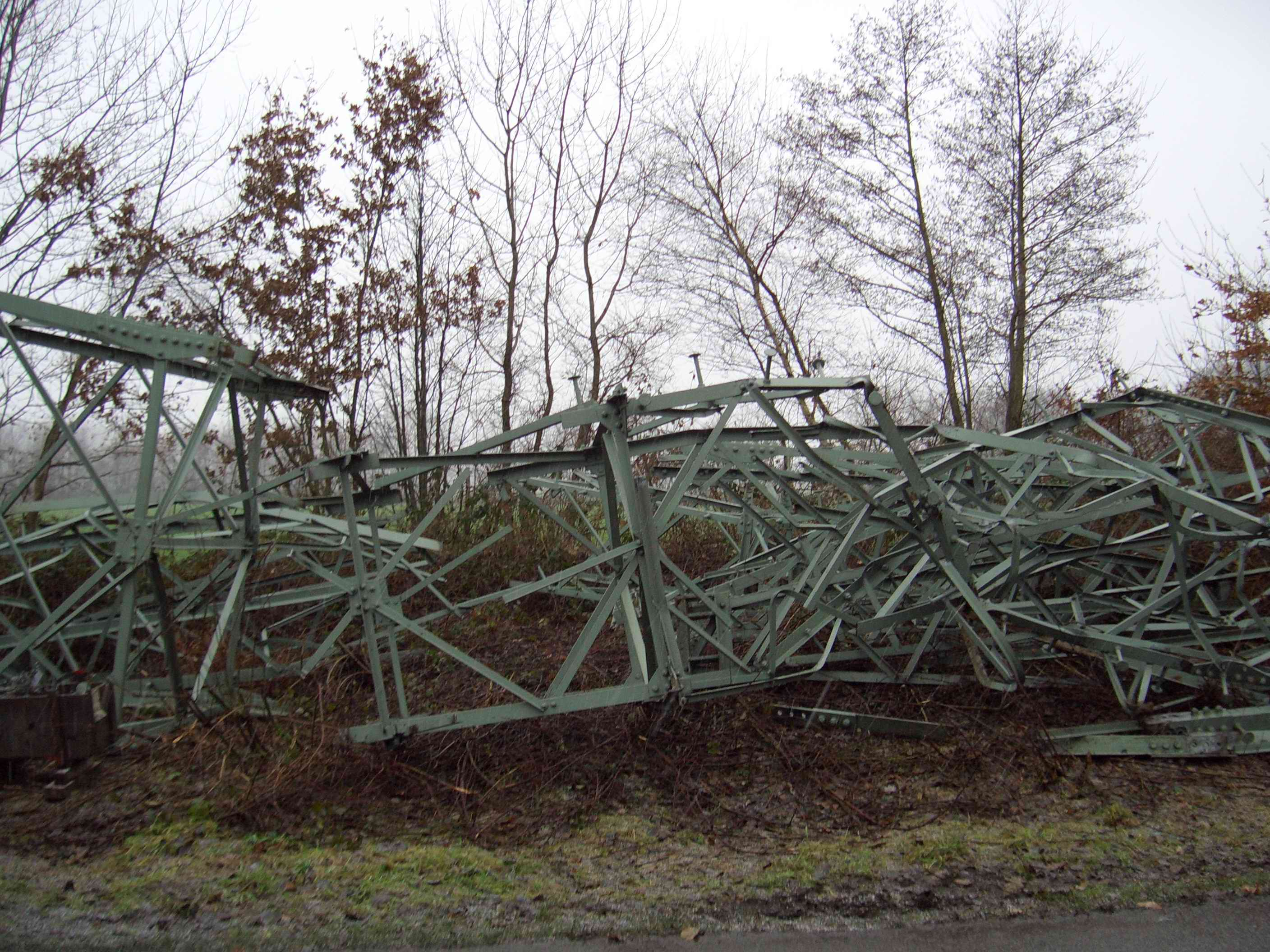 Durch das Schneechaos umgeknickter Strommast östlich von Vreden (Bauerschaft Kleinemast, Ecke Lanversweg/Abfahrt Teufelsschlucht)